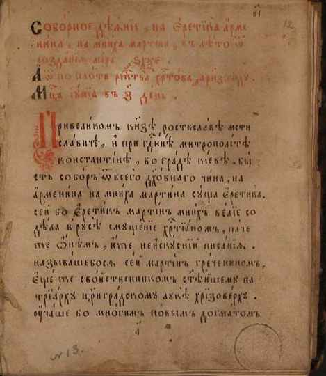 подложное сочинение миссионеров Синодального периода в Русской Православной Церкви, созданное в самом начале XVIII века в борьбе против старого обряда, главным персонажем которого является Мартин Арменин — еретик и мних (монах).